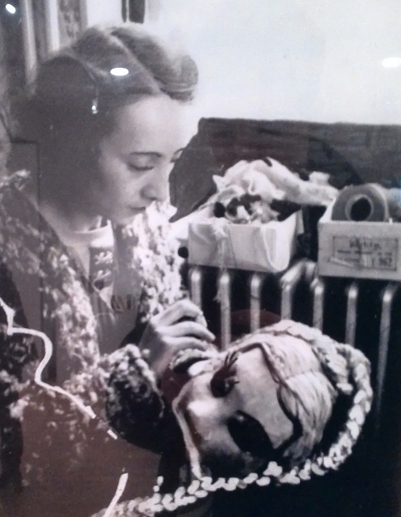 L'actrice Madeleine Barbulée, vers les années 1940.